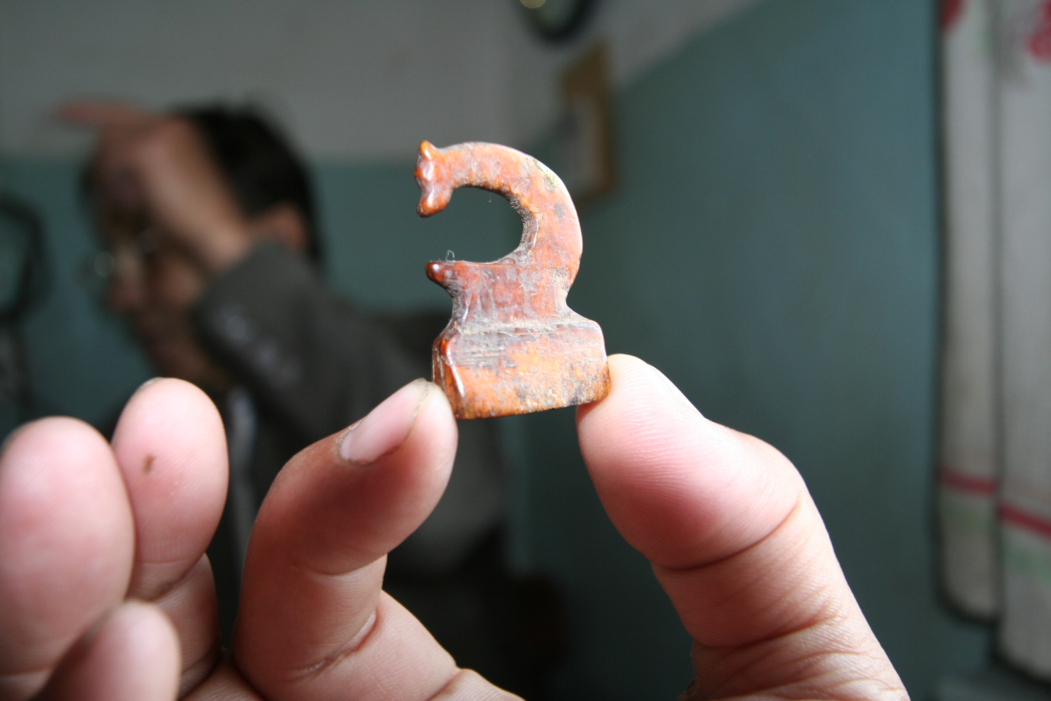 шахматная фигурка из моржовой кости. Русское Устье